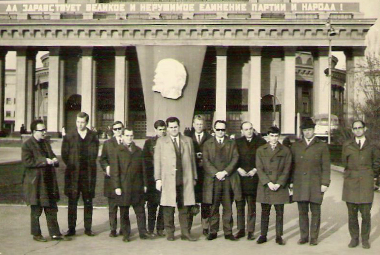 Die Mannschaft der Schachgemeinschaft Leipzig, die 1968 nach Nowosibirsk eingeladen wurde, zwei Mannschaftkämpfe in der Wissenschaftlerstadt Akademgorodok, einem Stadtteil von Novosibirsk, austrugen und die Stadt besichtigen durften. Von links nach rechts: Wolfgang Pietzsch, Günter Heinsohn, Manfred Schöneberg, Gottfried Braun, Detlev Neukirch, Helge Kildal, Ullrich Brümmer, Arthur Hennings, Manfred Müller, Lothar Vogt, Horst Broberg und Manfred Böhnisch. Das Hintergrundgebäude (Oper von Nowosibirsk) zeigt den Kopf von Lenin und oben den Spruch Es lebe die große und unverbrüchliche Einheit von Partei und Volk.